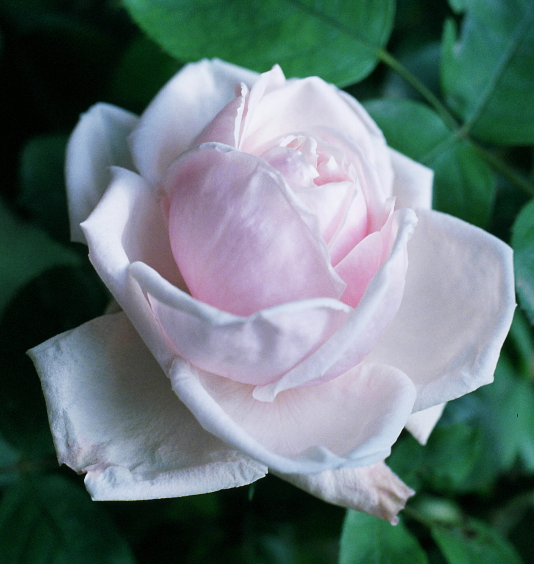 Rosa 'Paul's Early Blush', Híbridos reflorecientes, sect. Rosa. Real Jardín Botánico, Madrid